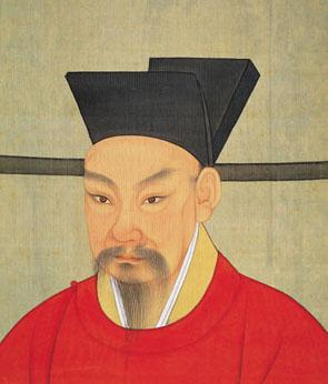 文言: 宋理宗安孝皇帝